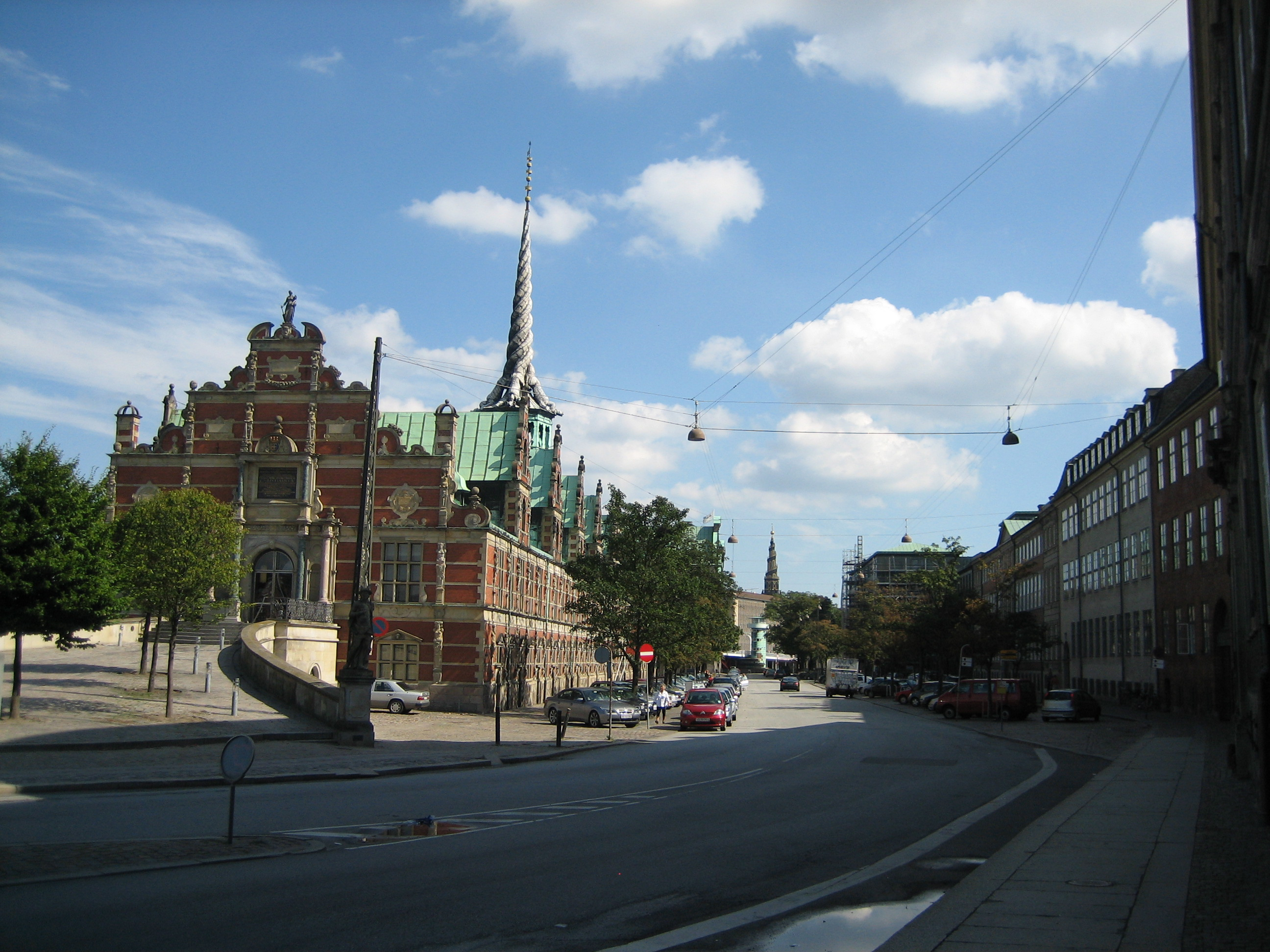 Slotsholmsgade on Slotsholmen in Copenhagen, Denmark